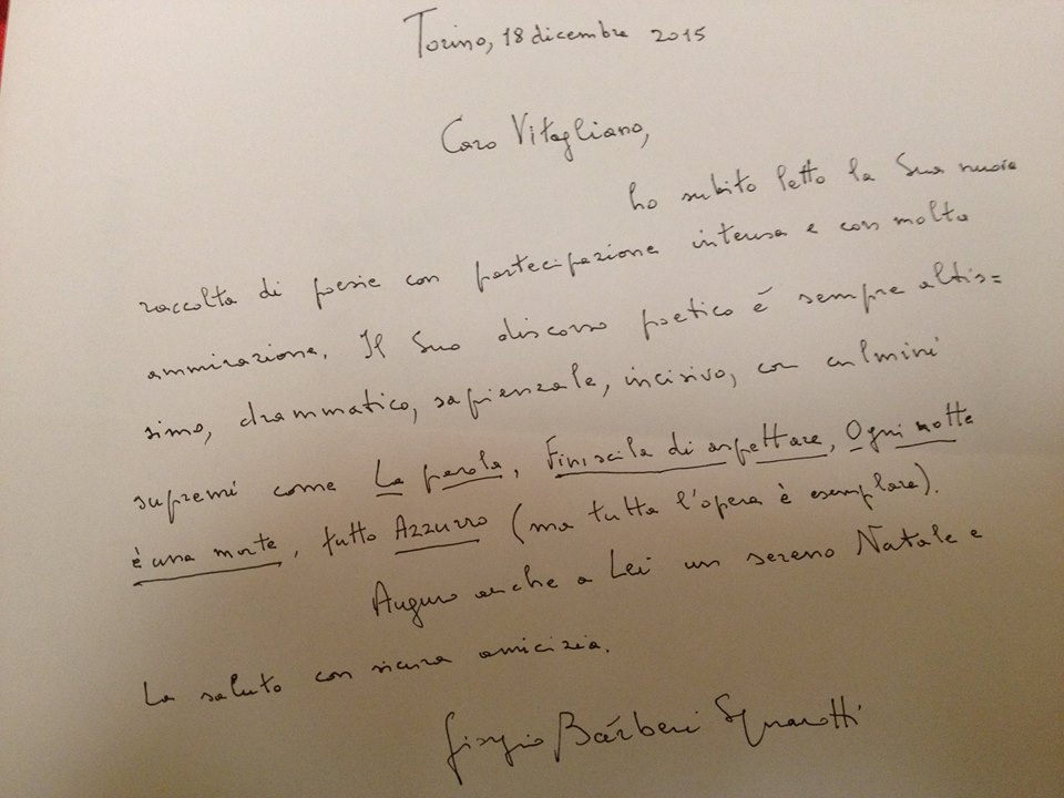 Recensione di Squarotti su Pasquale Vitagliano